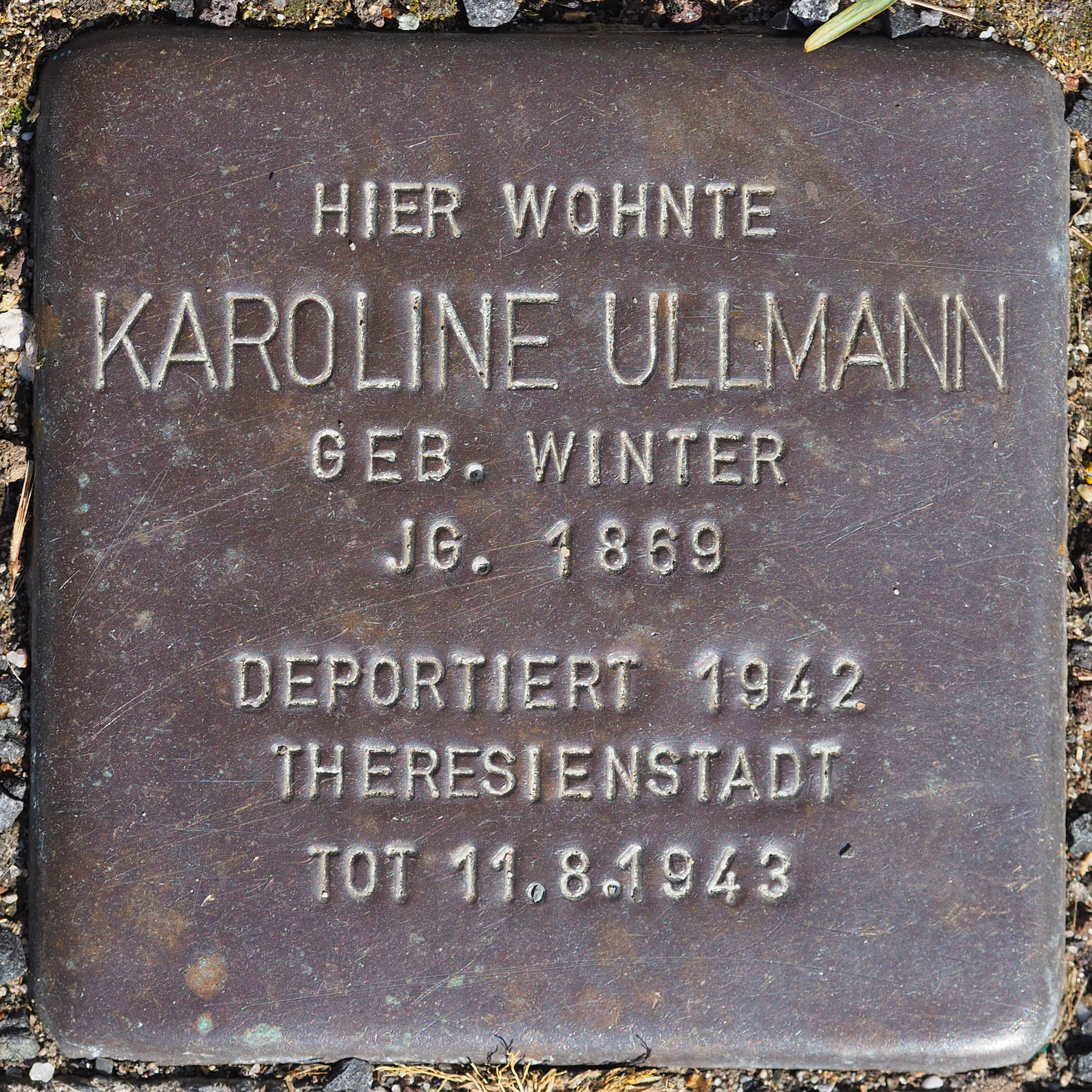 Stolpersteine MG: Ullmann, Karoline